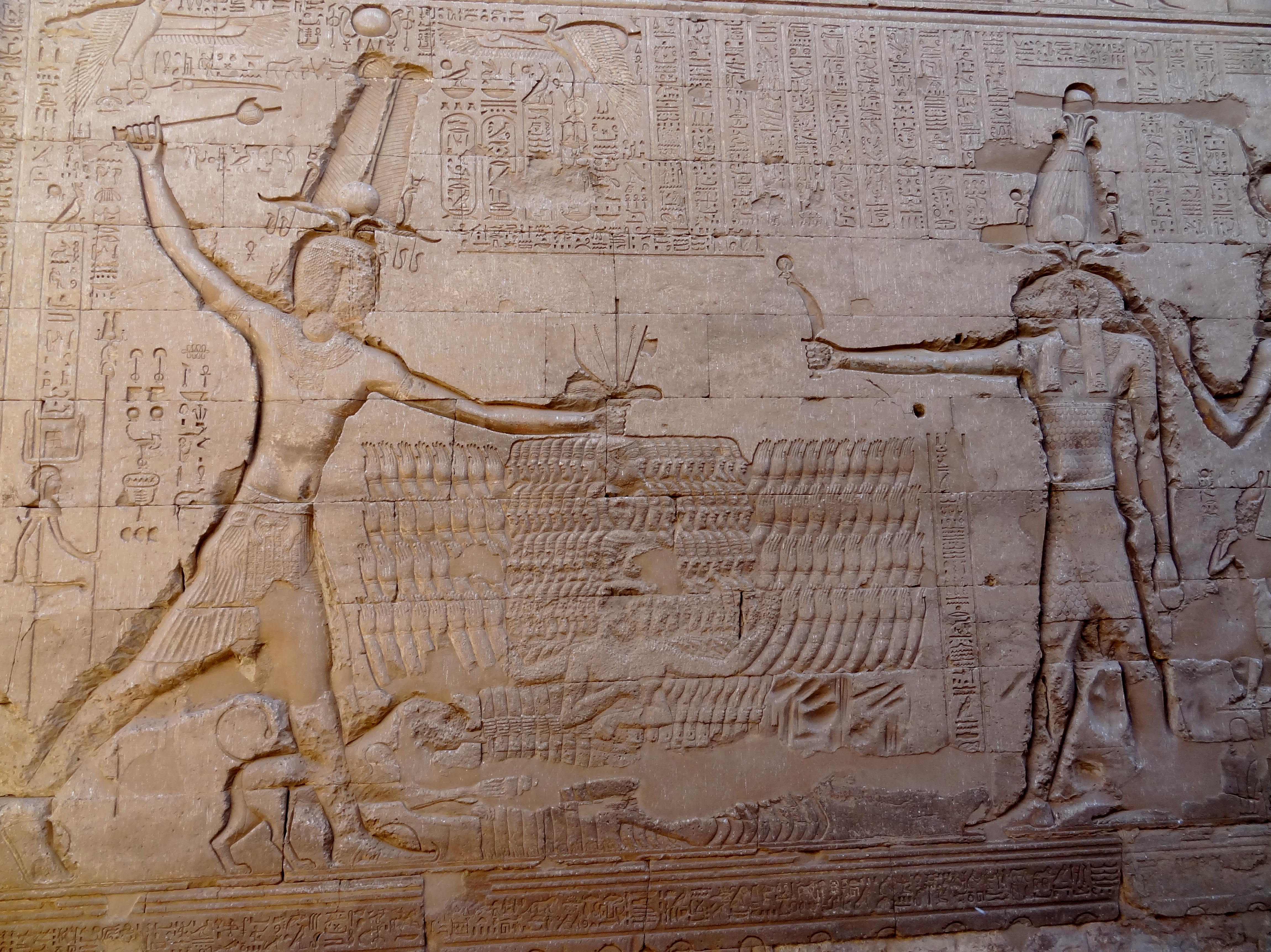 Kaiser Trajan erschlägt vor Chnum die Feinde des Landes, Relief an der Nordostseite des Pronaos des Tempels von Esna aus römischer Zeit, Ägypten